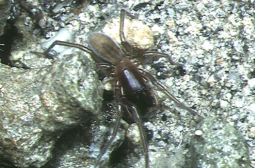 male Desis japonica from Okinawa.